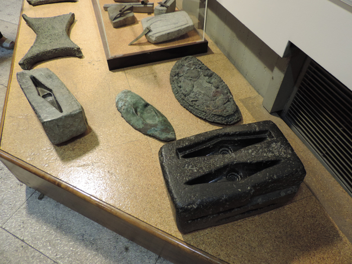 Matrici di fusione, museo archeologico di Cagliari